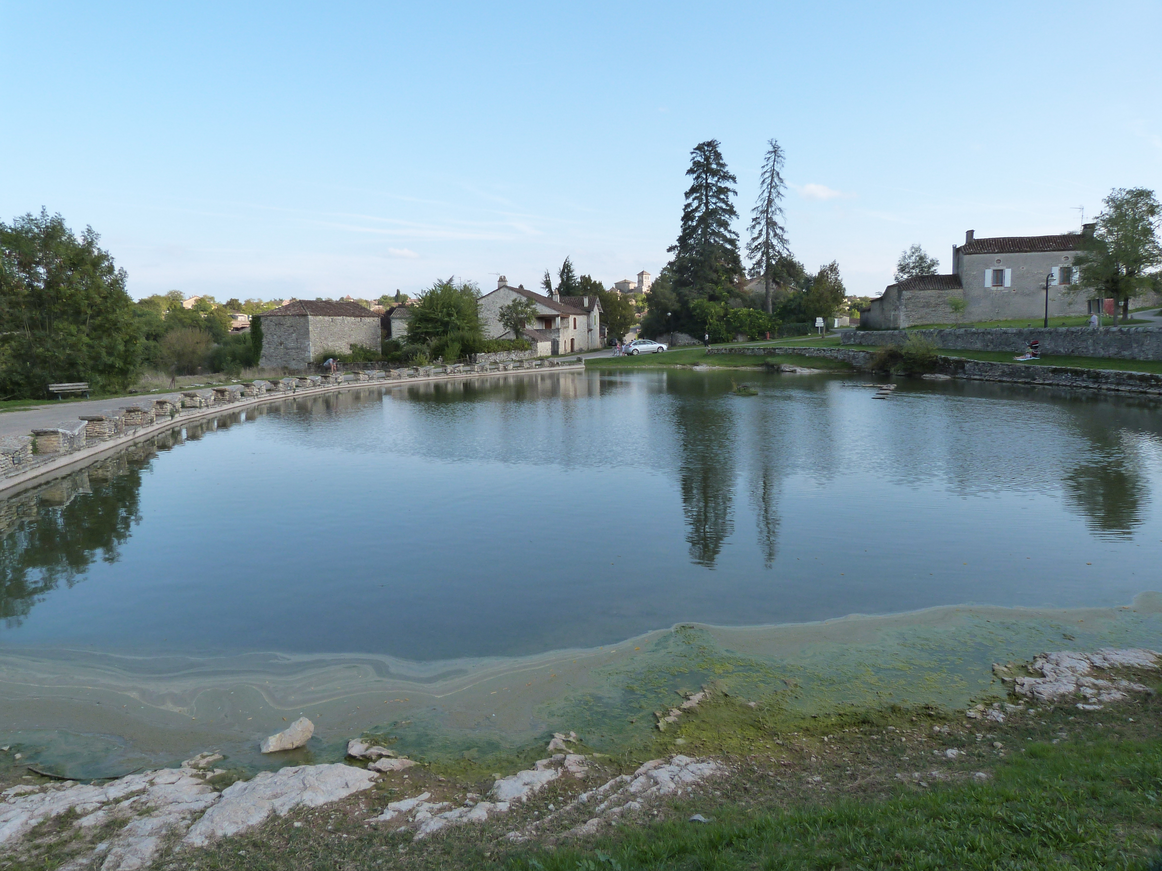 le lac d'Aujols et ses lavoirs paillons (Lot)